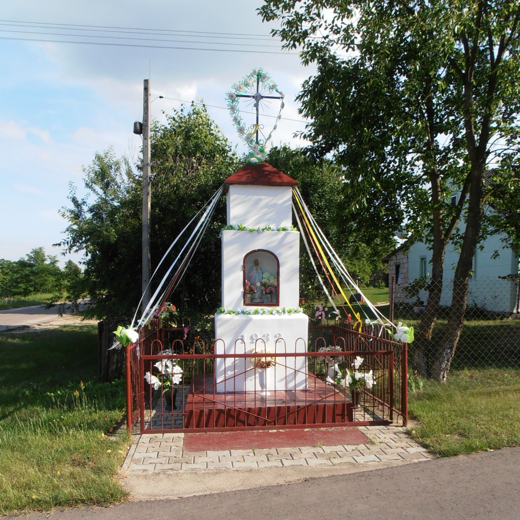 Drożdżak (pow. łukowski, woj. lubelskie, Polska). Kapliczka przydrożna.